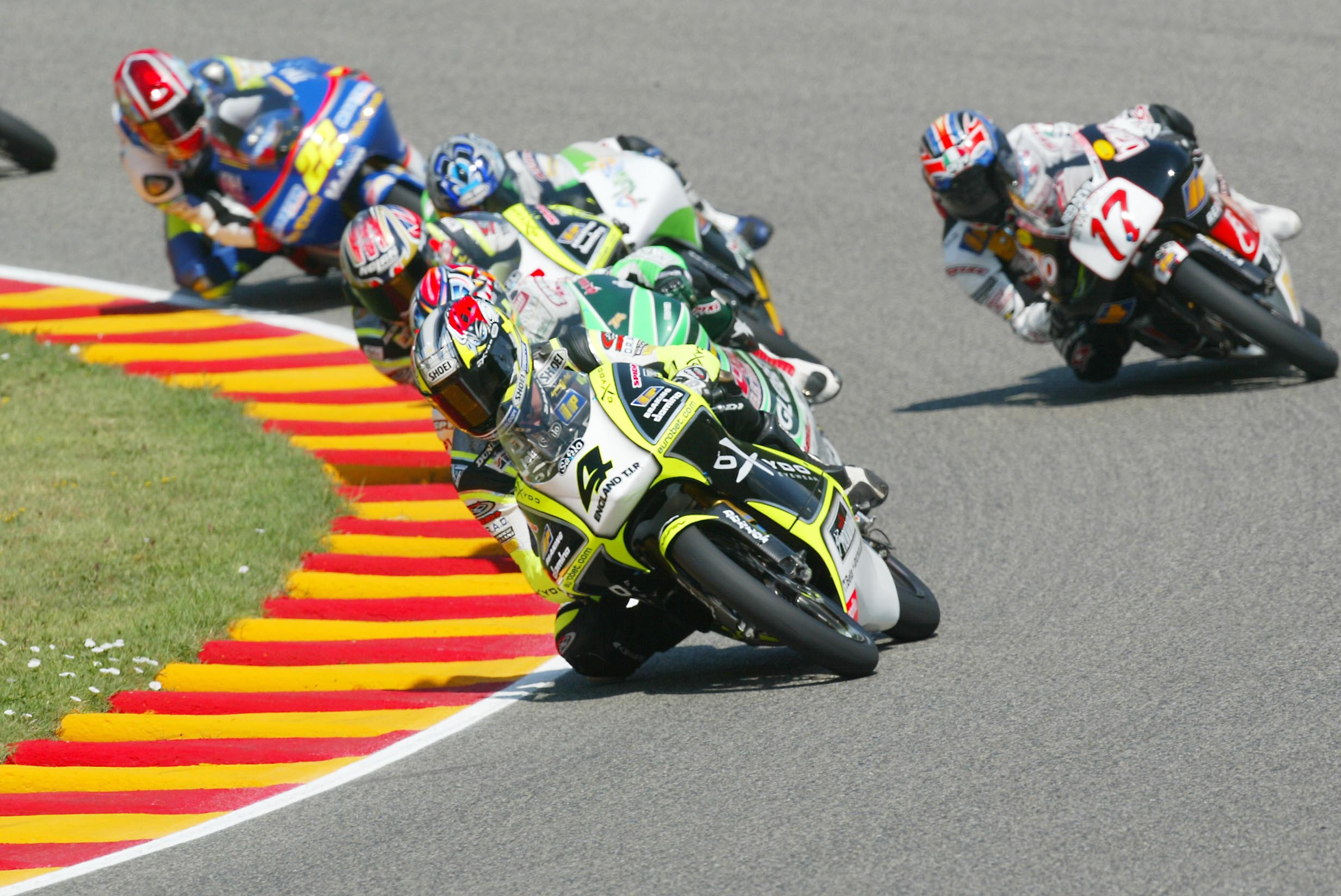 Lucio Cecchinello en bagarre pour la victoire lors du Grand Prix d'Italie 2003